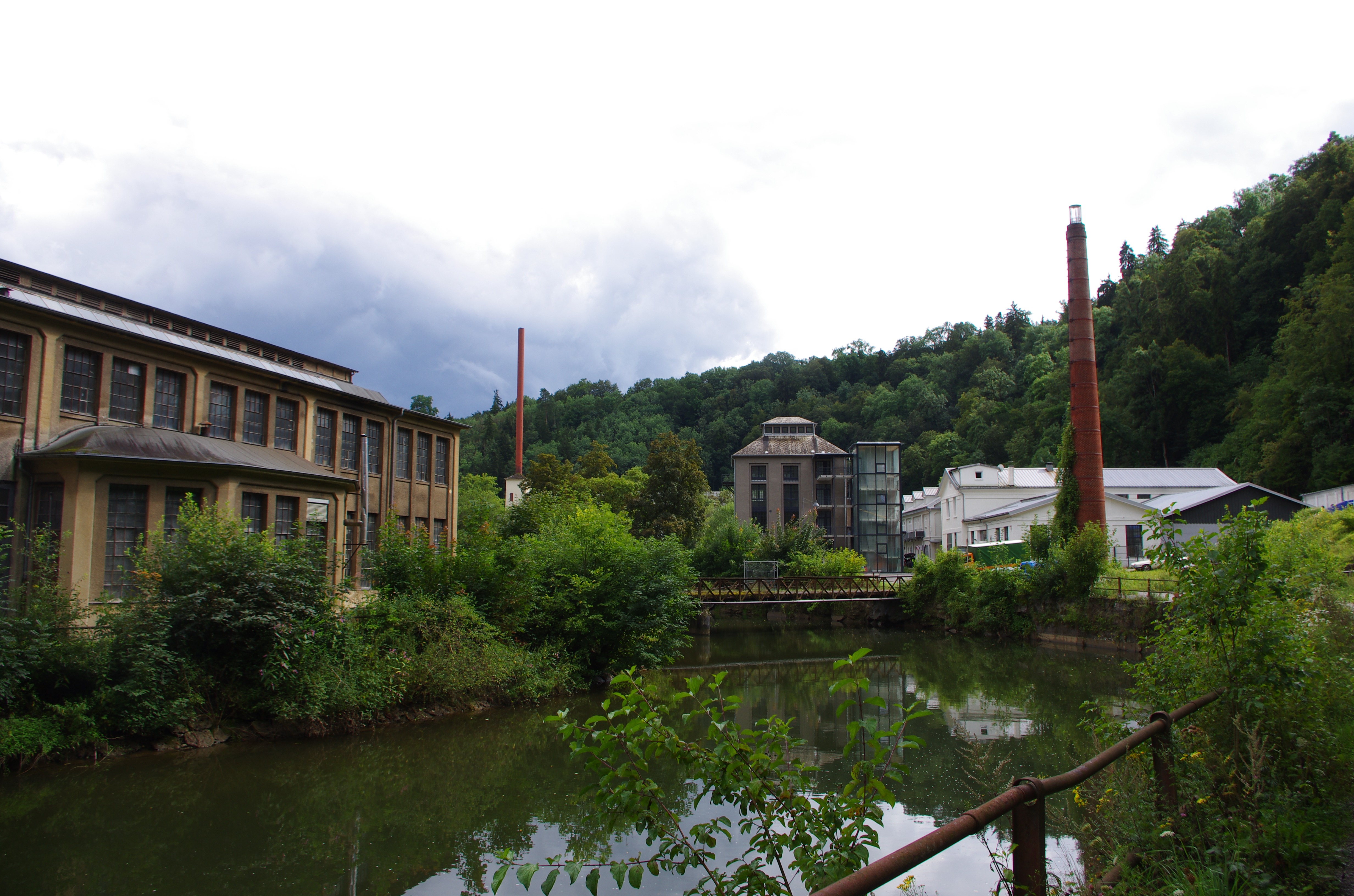 Werkstattengebäude, Neckarstraße 142, auf dem Gelände der ehemaligen Pulverfabrik Rottweil